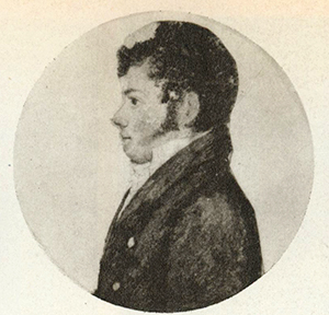 Achatius Kahl (1794-1888)